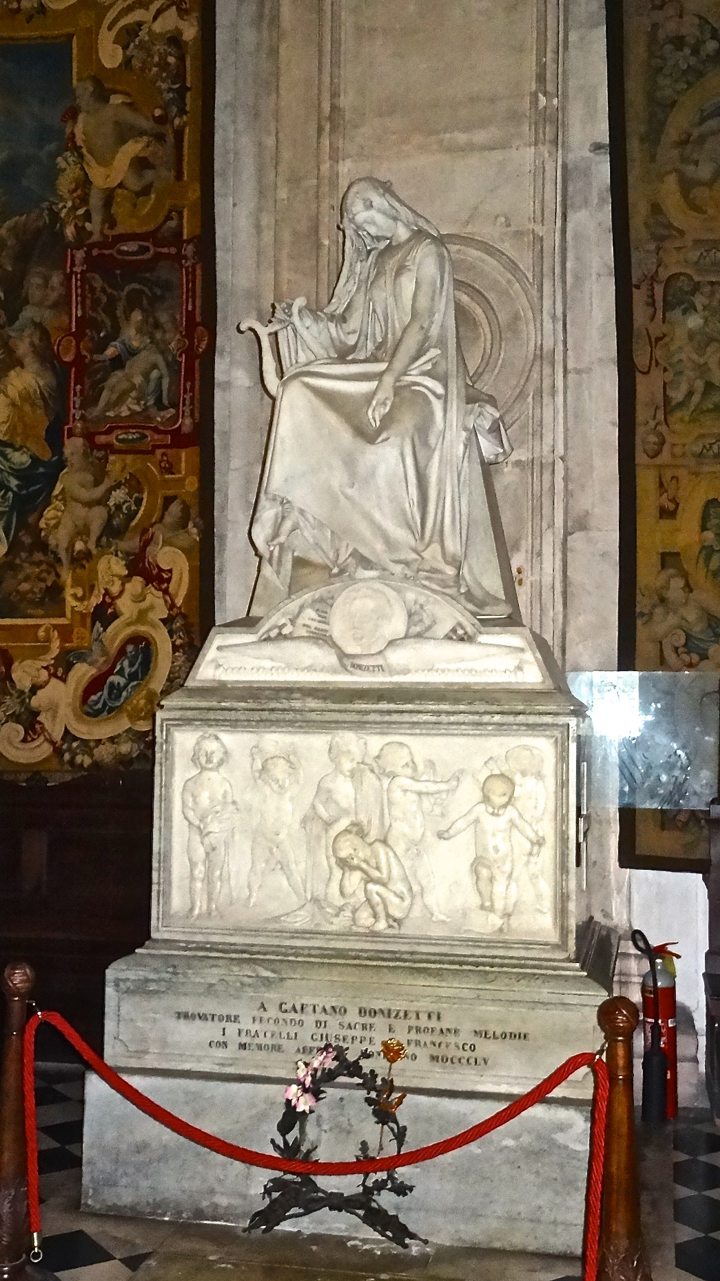 Gaetano Donizetti Tomb in Bergamo